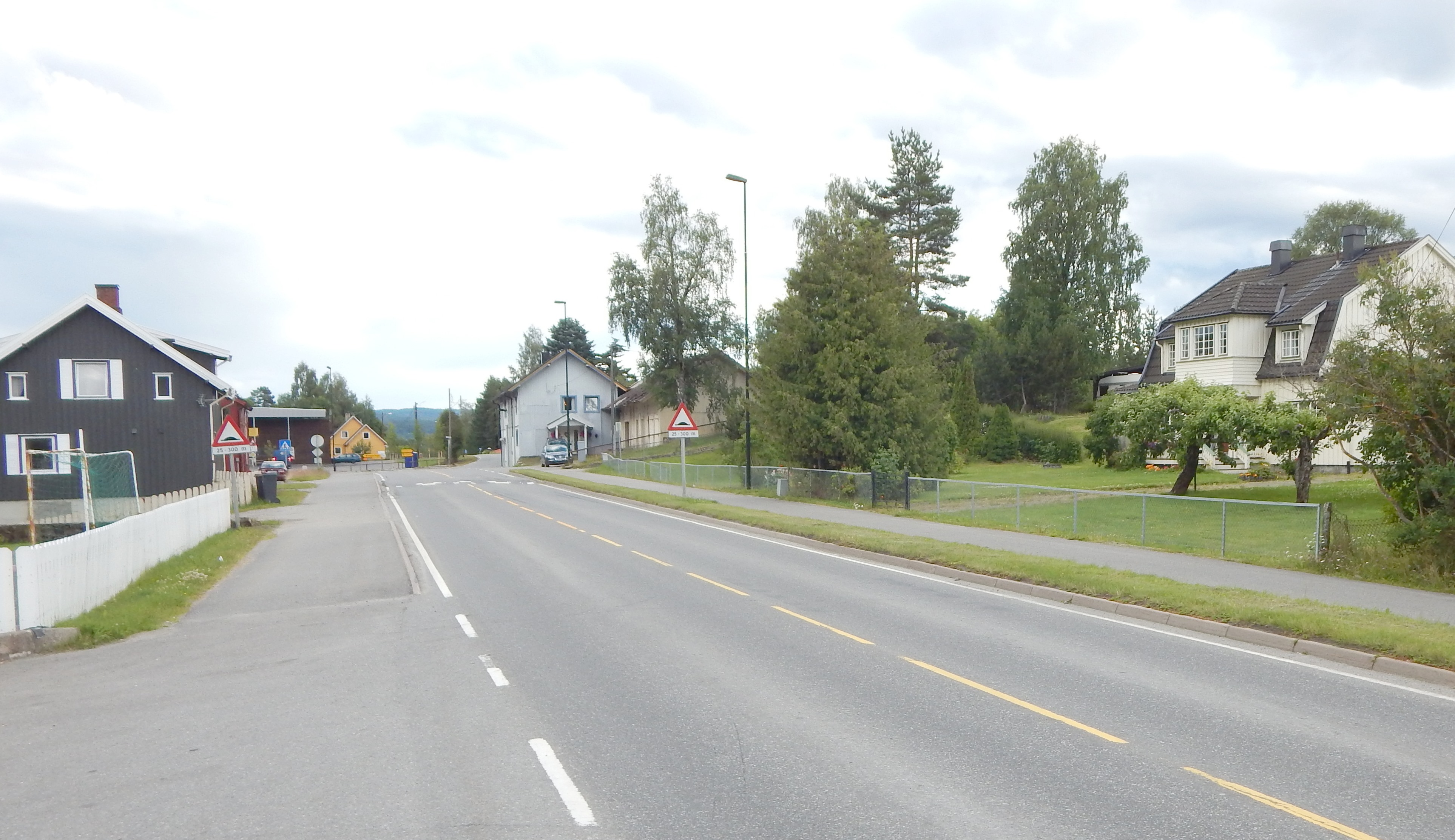 Fylkesvei 24 gjennom Gata, bygdesentrum i Vallset